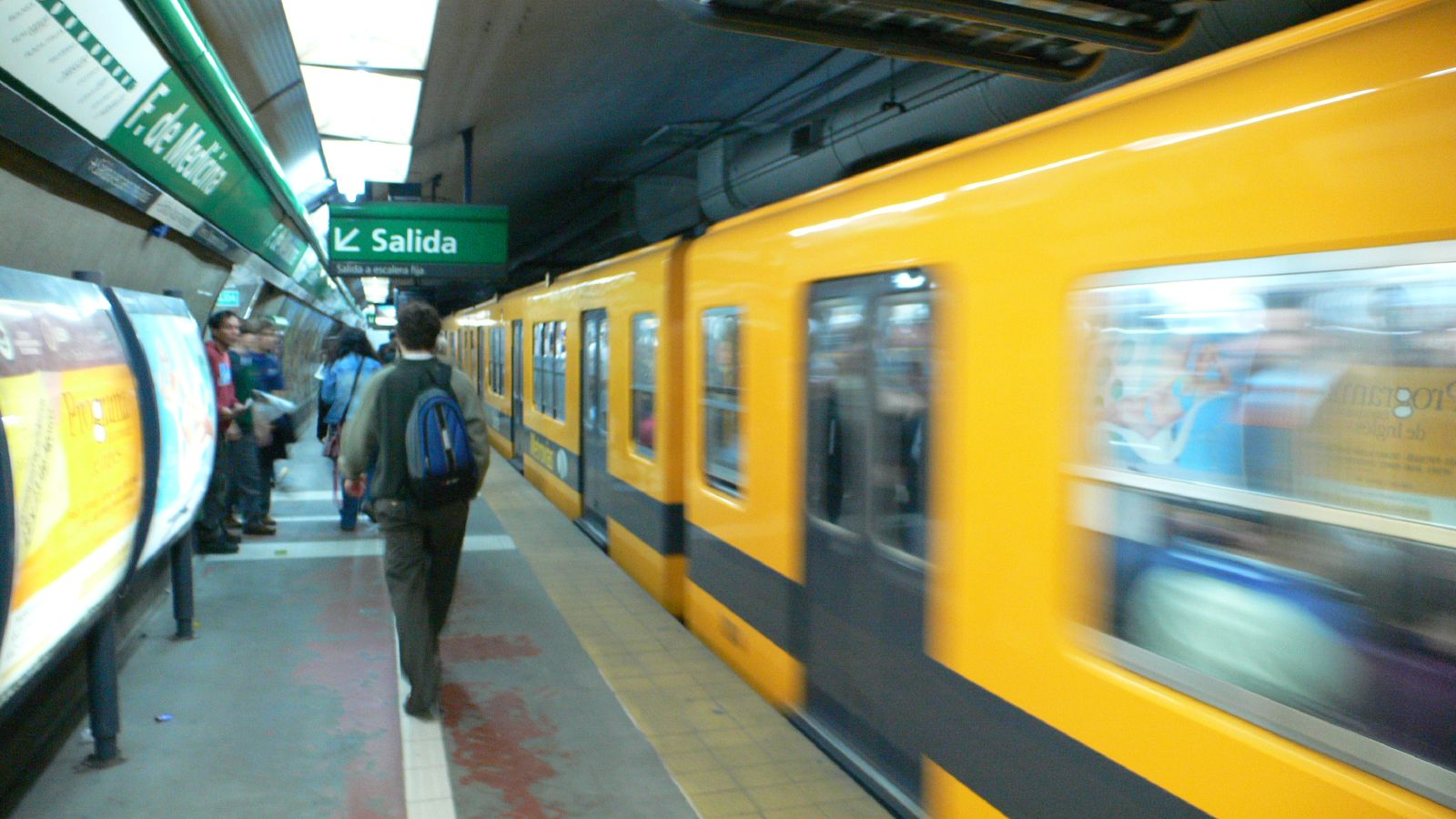 Una formación de coches Nagoya abandonando la estación Facultad de Medicina de la línea D del subterráneo porteño